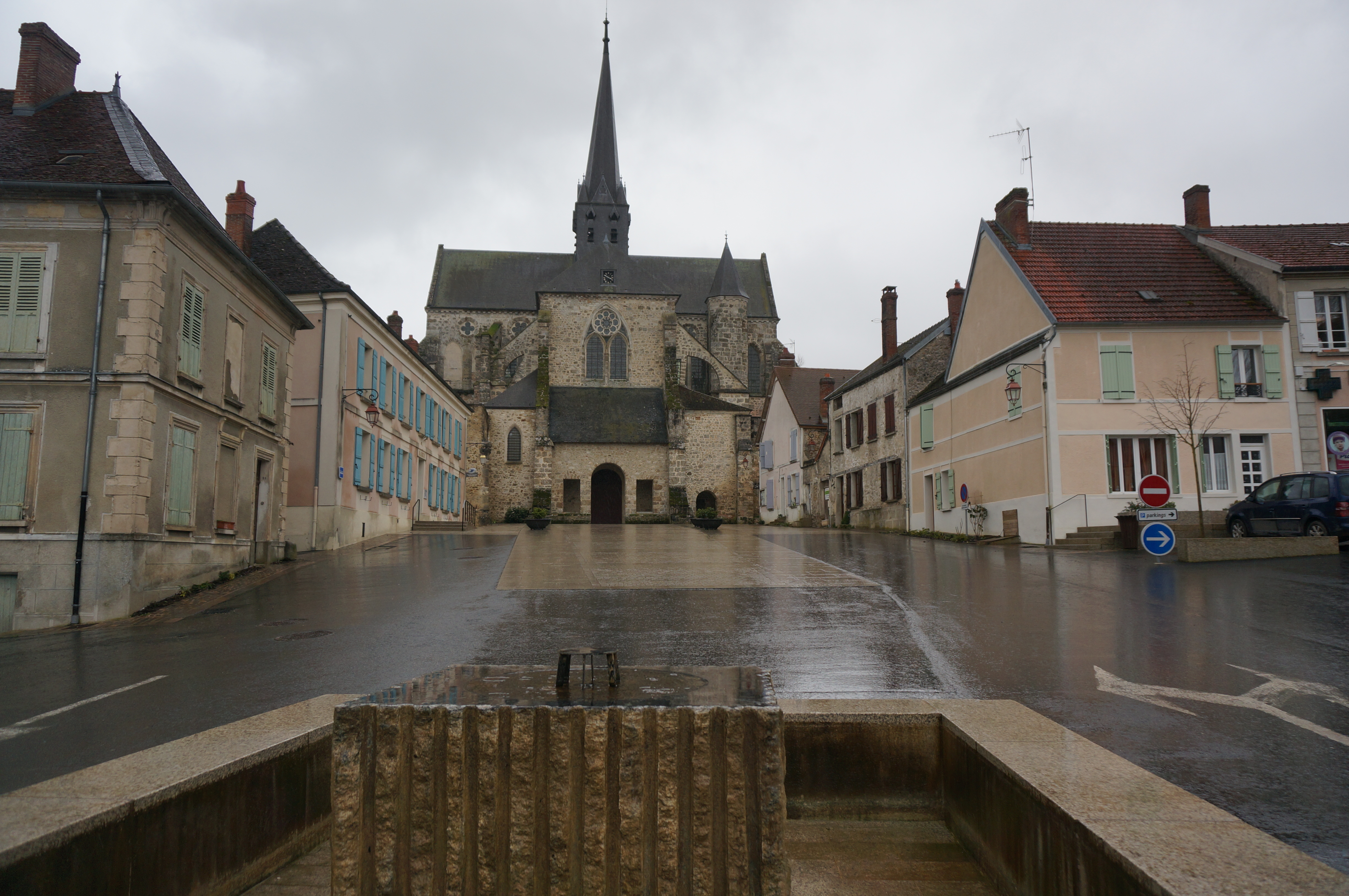 Abbatiale Saint-Pierre d'Orbais-l'Abbaye. Images.